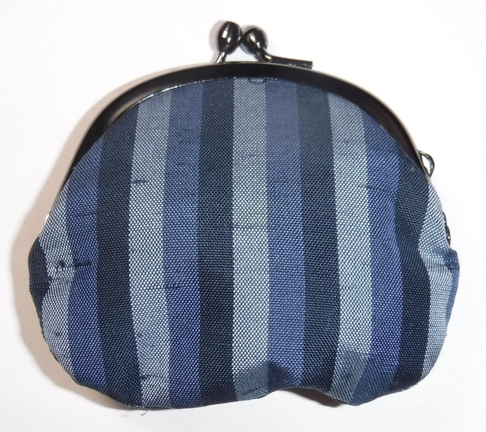 牛首紬は、主に石川県白山市白峰地区（旧白峰村）において生産される紬織物。その絹織物から作られた小銭入れ